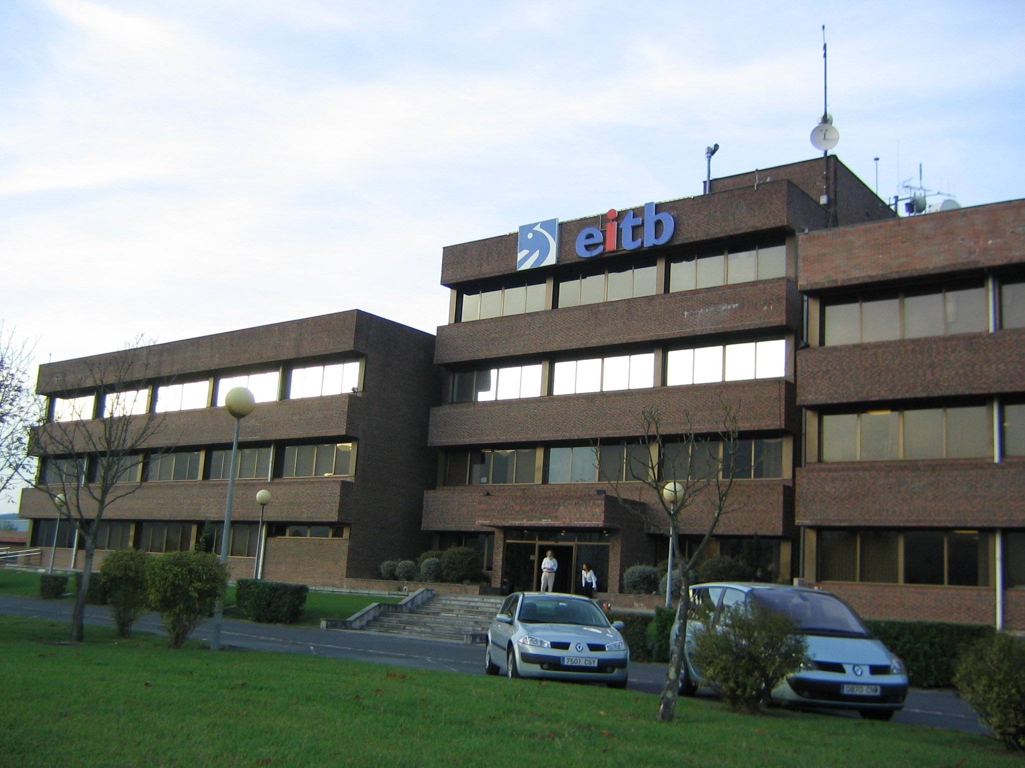 Sede de EITB en Iurreta, Vizcaya, País Vasco, España.